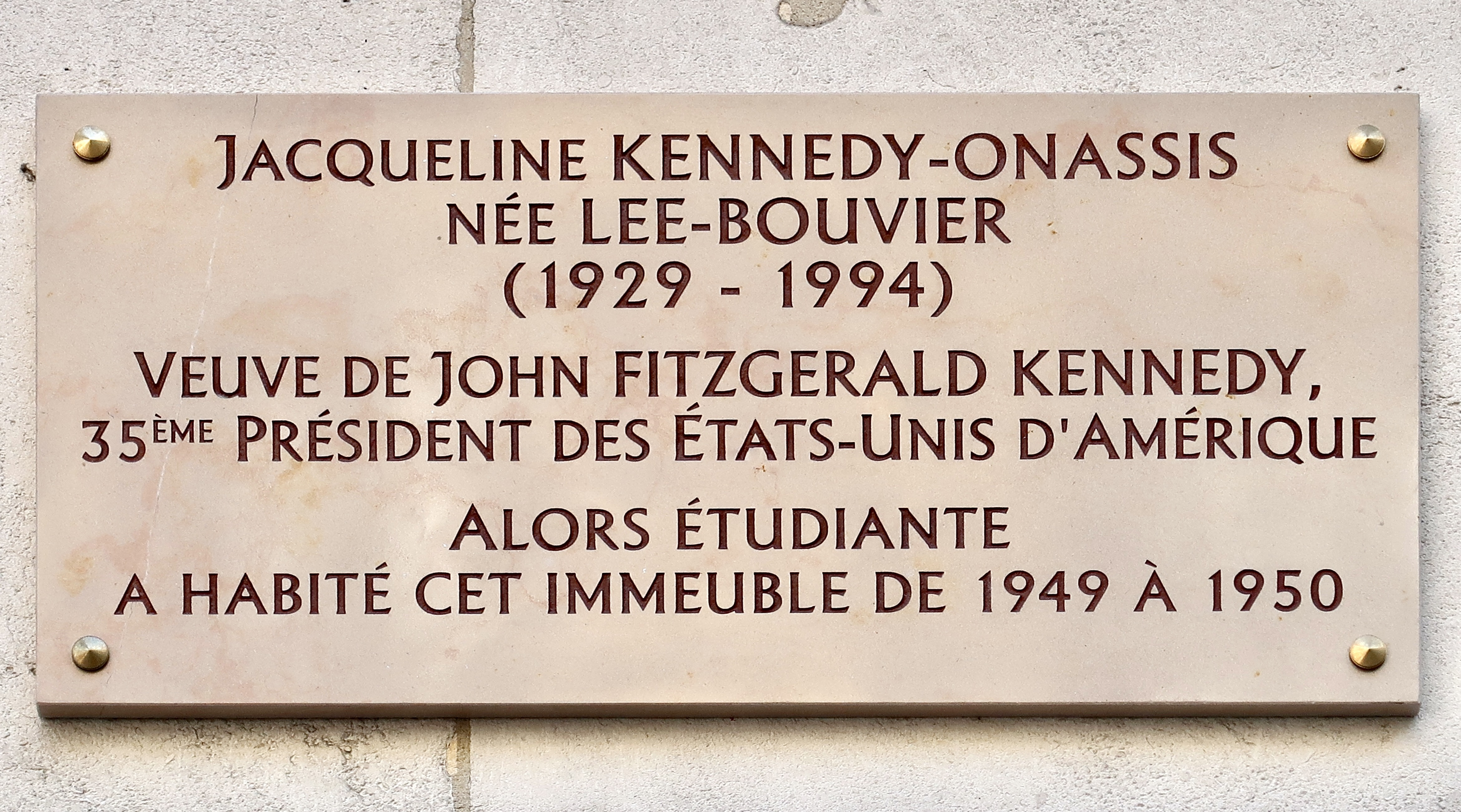 Plaque en hommage à Jacqueline Kennedy Onassis, 78 avenue Mozart (Paris, 16e).